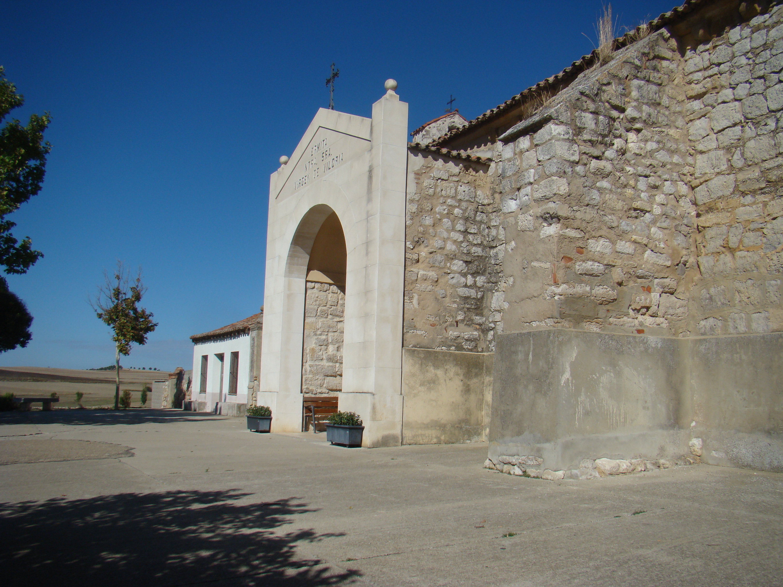 Ermita de Nuestra Señora de Viloria, a un km y medio de Cigales (Valladolid, España).